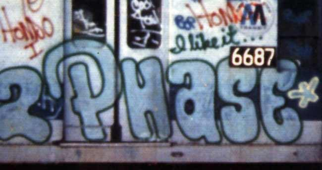 Graffiti